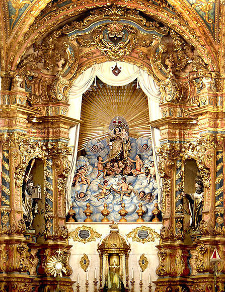 Interior da Basílica de Nossa Senhora do Carmo, Recife, Pernambuco, Brasil.